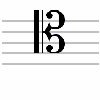 C clef 4